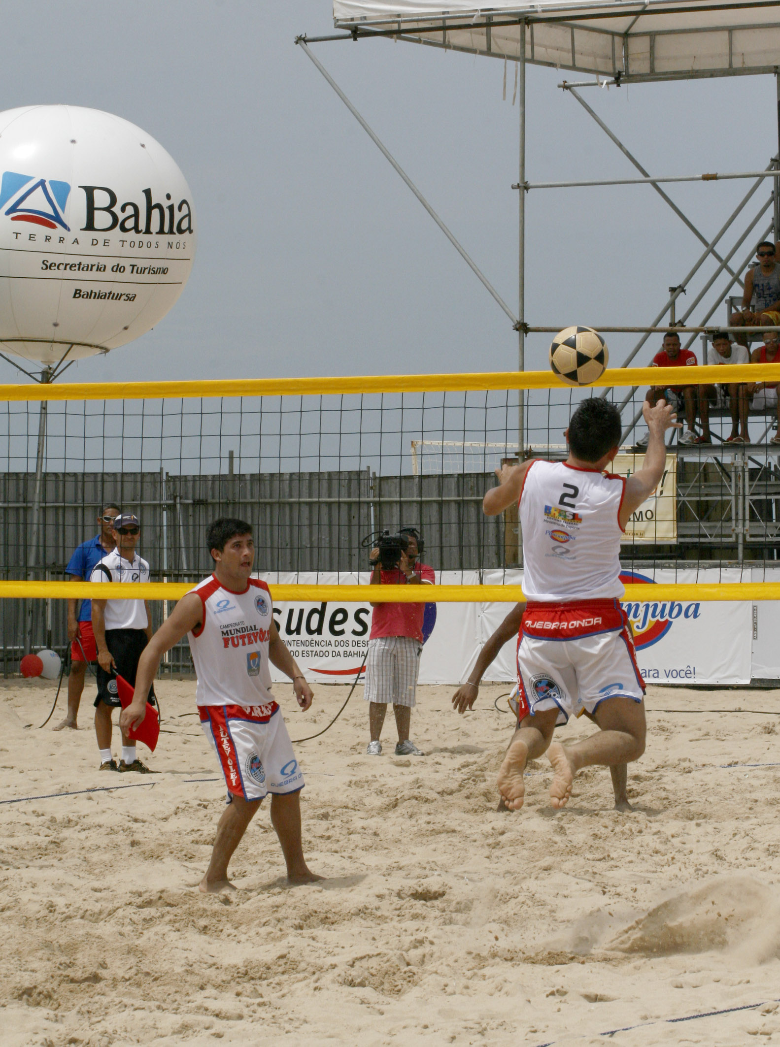 Governador Jaques Wagner participa da final do Futevôlei Foto: Roberto Viana/AGECOM